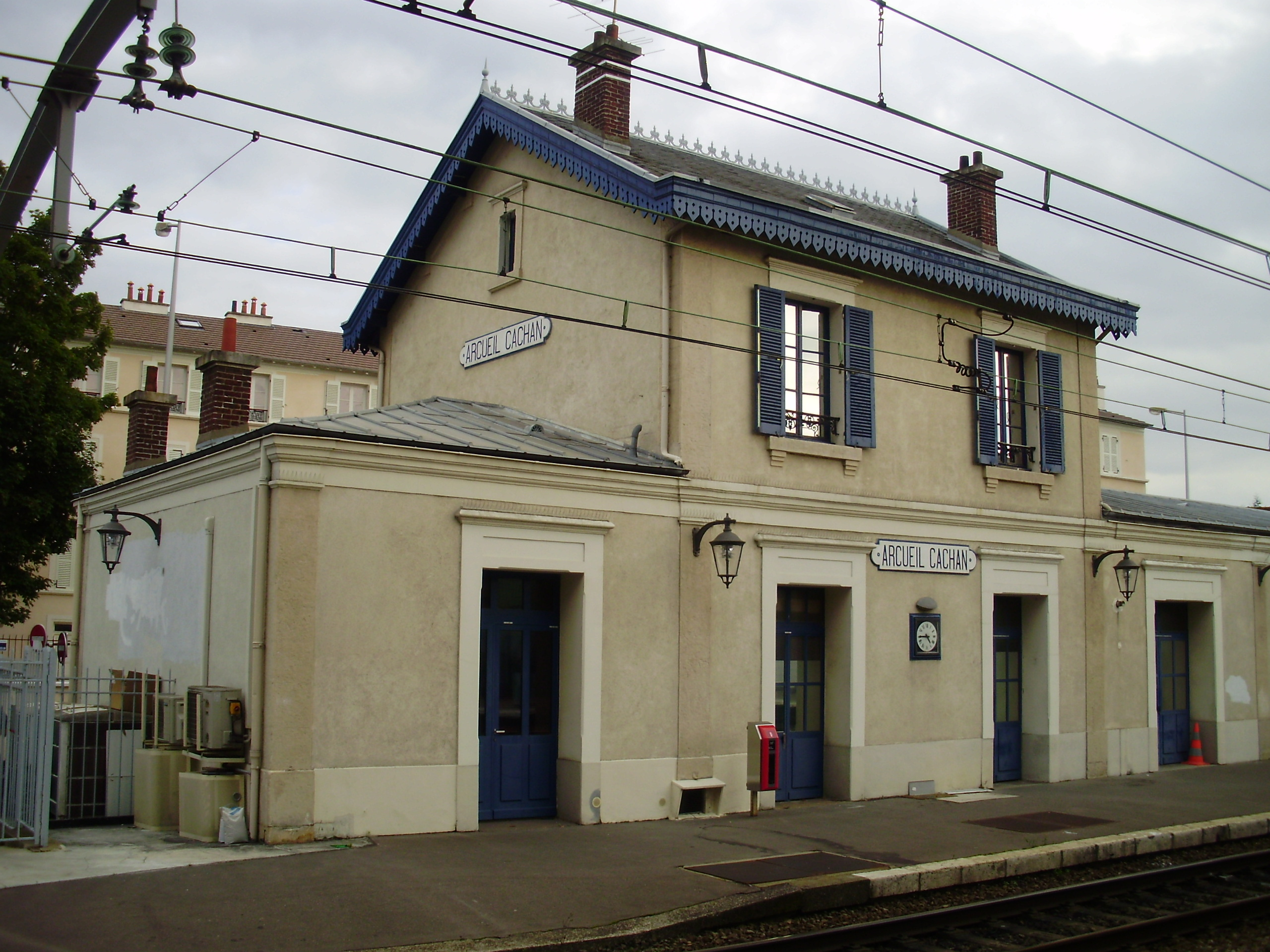 Gare d'Arcueil - Cachan, à Cachan, Val-de-Marne, France (bâtiment voyageurs historique vu depuis la rue de la Gare à l'ouest des voies)